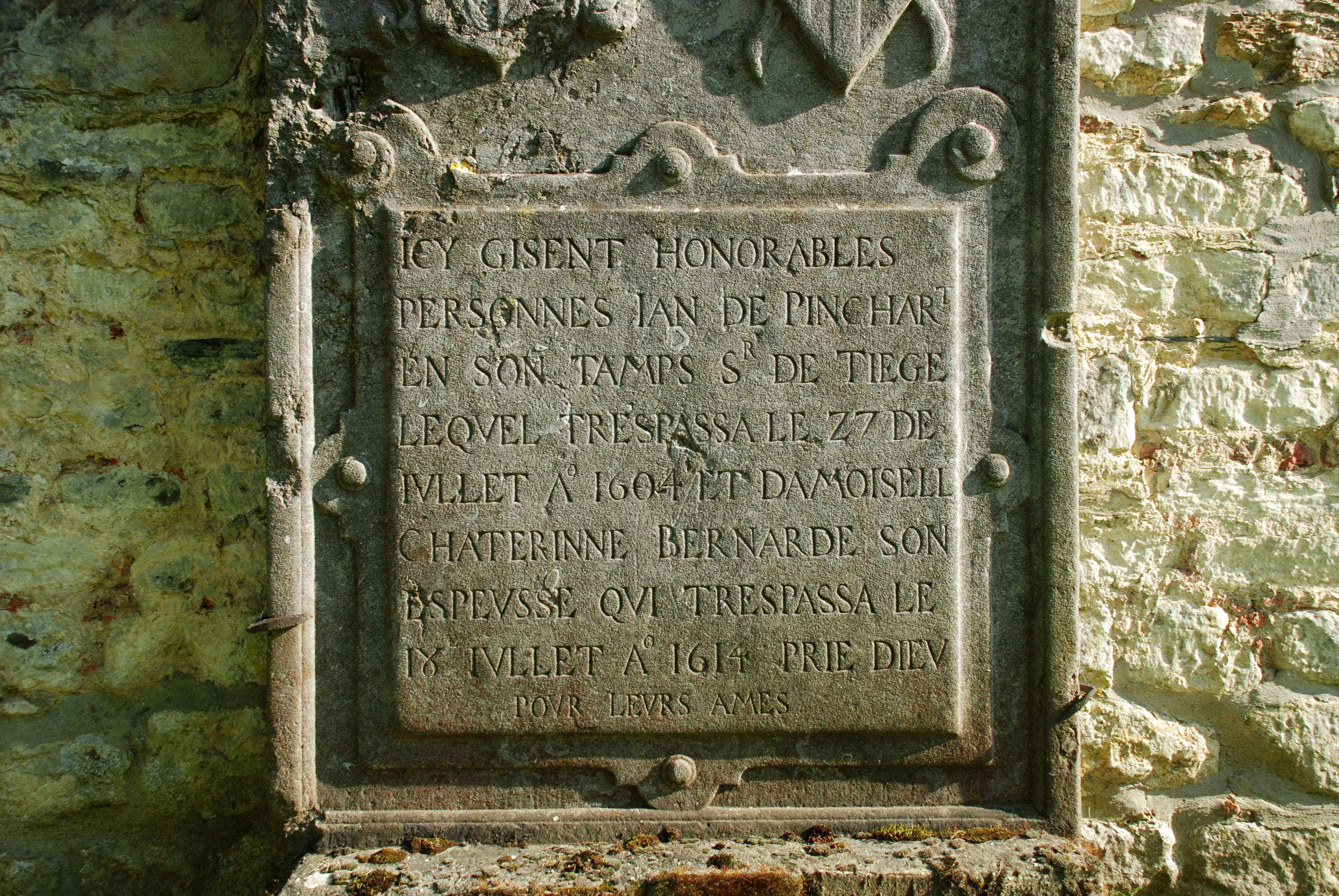 Belgique - Brabant wallon - Mont-Saint-Guibert - Église Saint-Pierre de Corbais - dalle funéraire de Jan de Pinchart (mort en 1604)